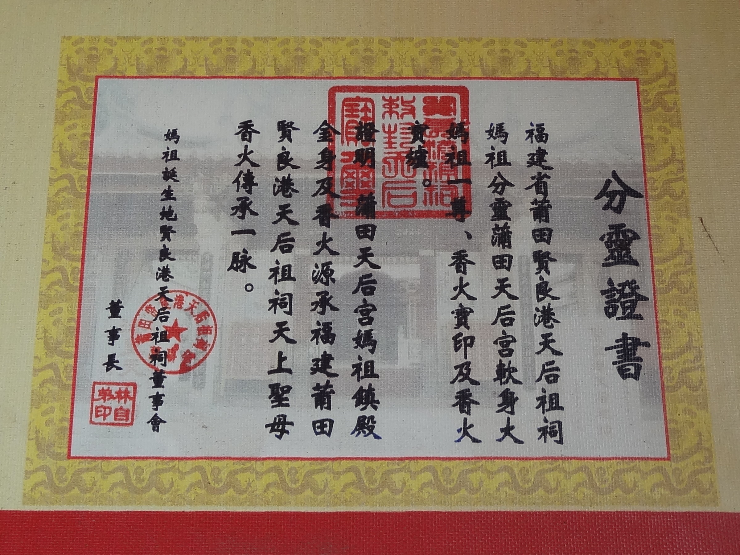 福建省莆田賢良港天后祖祠發給臺灣桃園市大溪區蒲田天后宮的分靈證書。